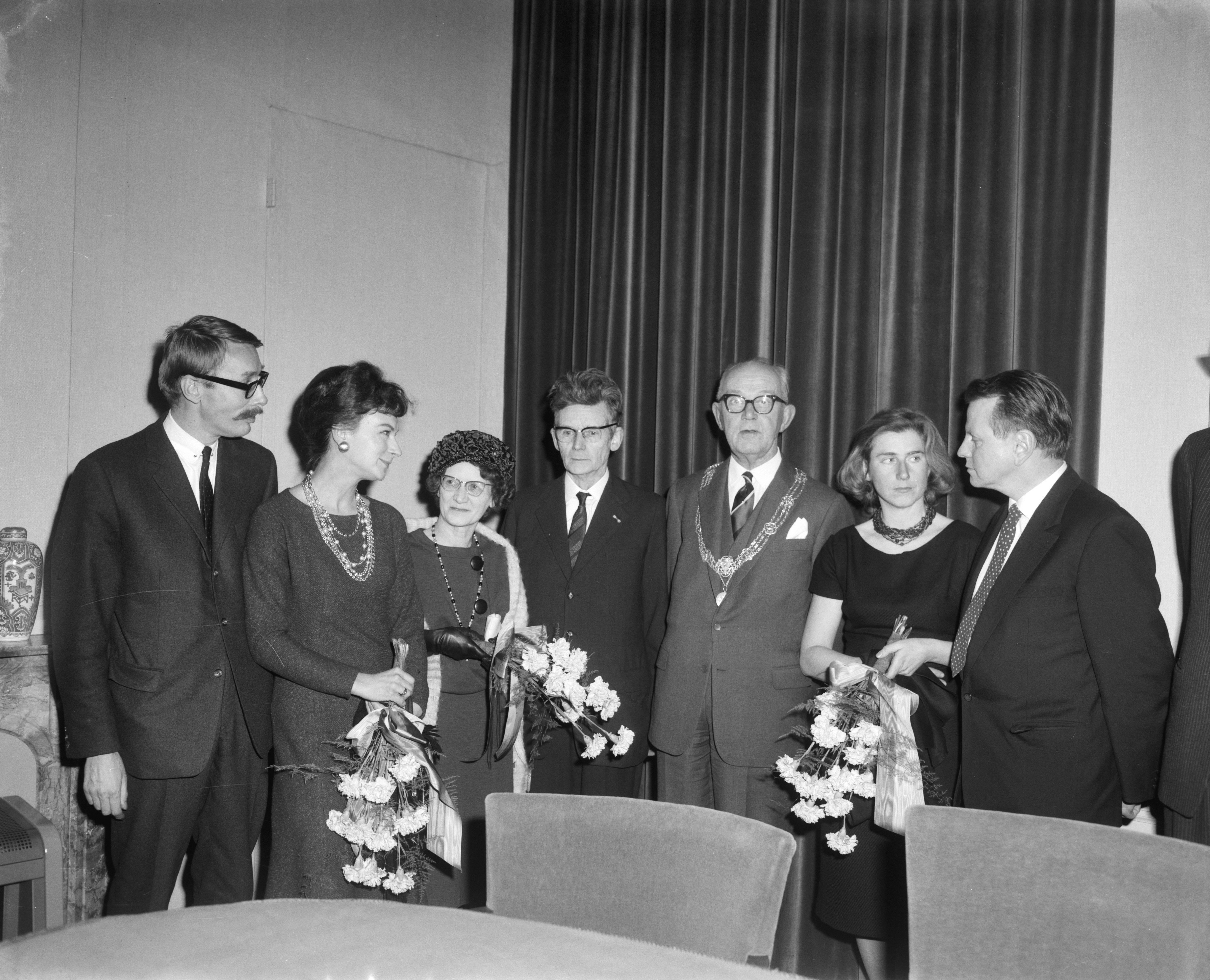 Prijsuitreiking Jan Campertprijzen in Den Haag , v.l.n.r Gerrit Kouwenaar en echtgenote Paula Hofmeester, Hendrik de Vries en echtgenote Riek van der Zee, burgemeester Kolfschoten en J.W. Holsbergen en echtgenote (Paula Rietveld?). Datum 19 december 1962